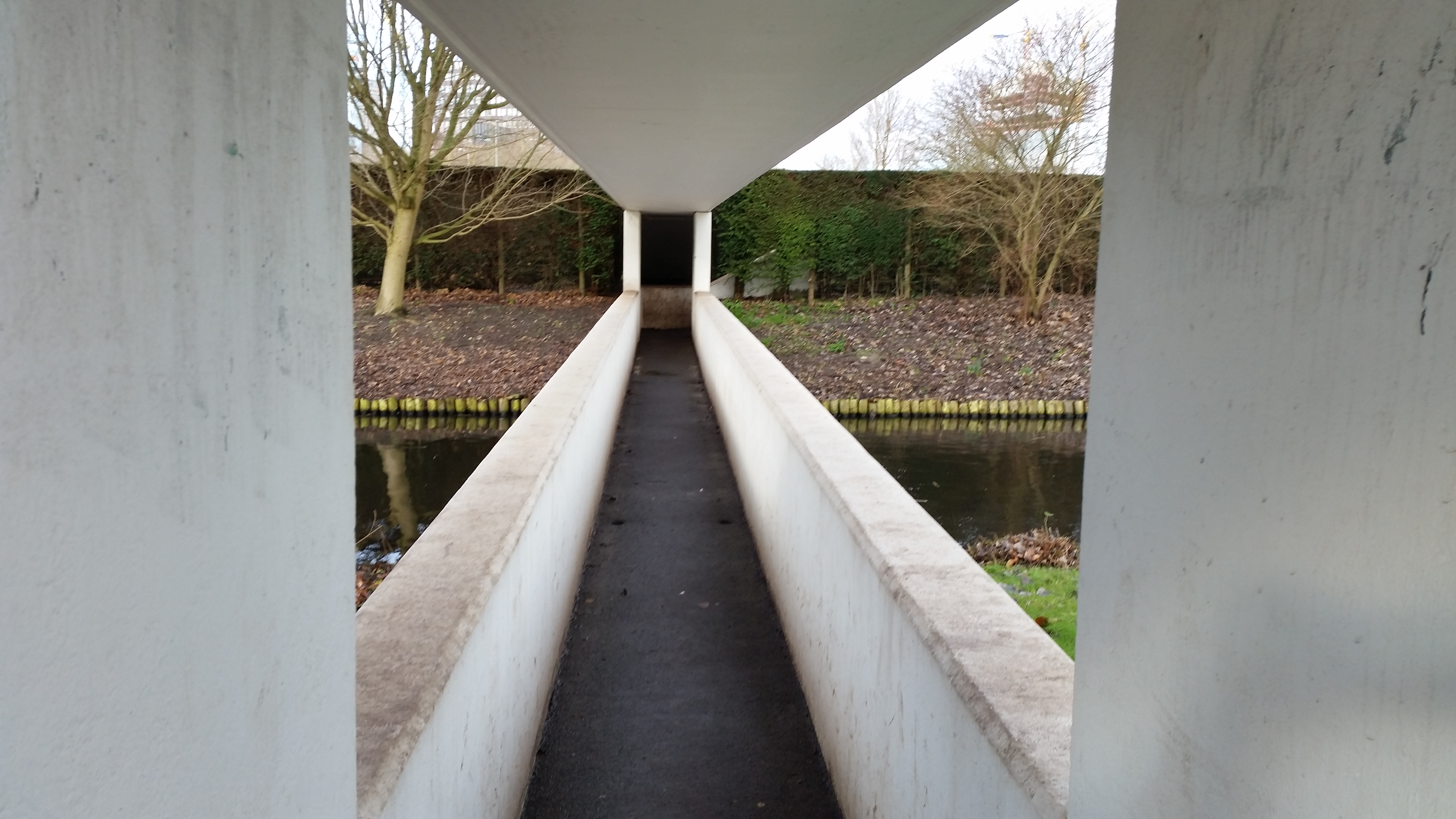 Benedendek van Brug 842 (in Amsterdam)